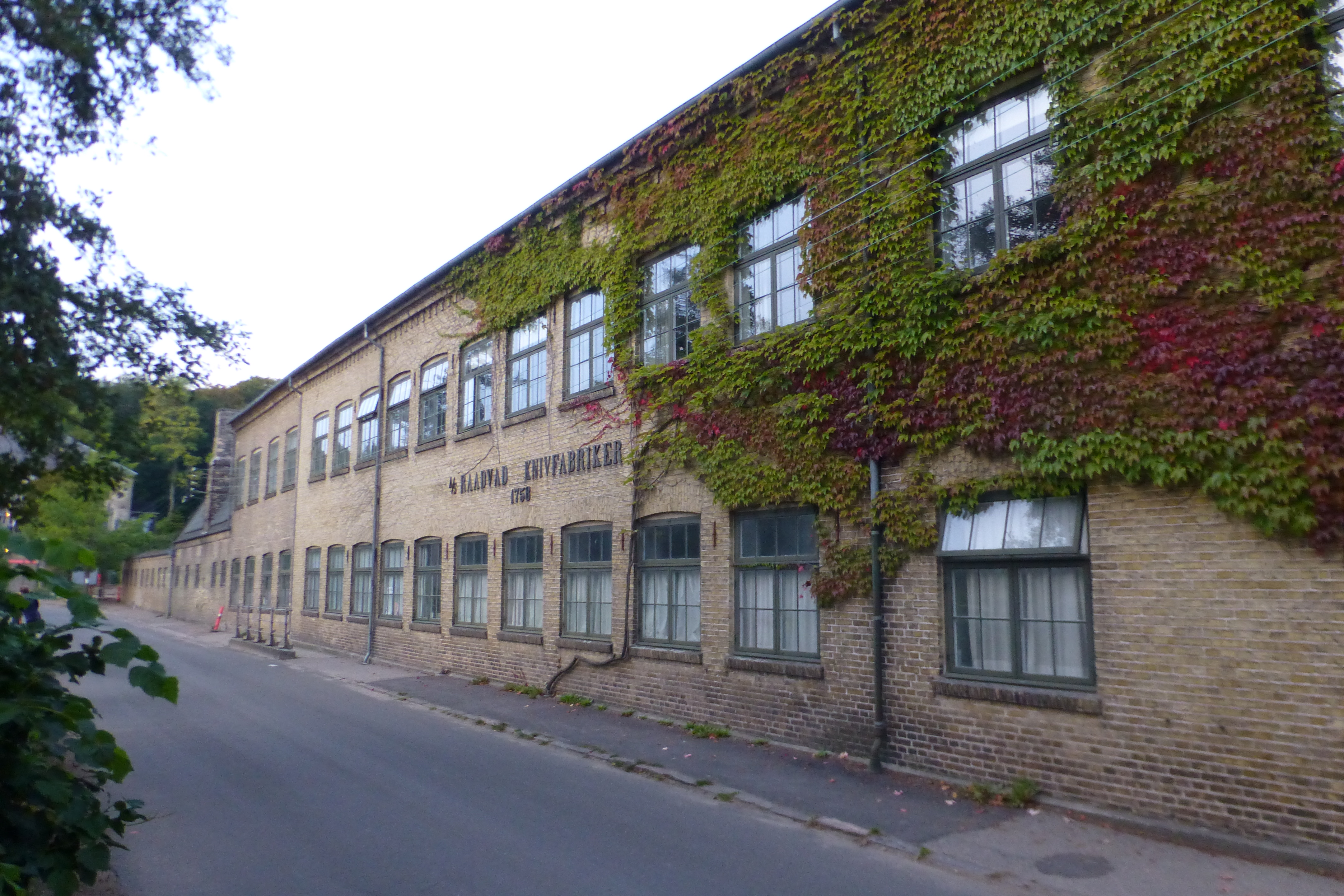 Raadvad fabrikker ved Mølleåen